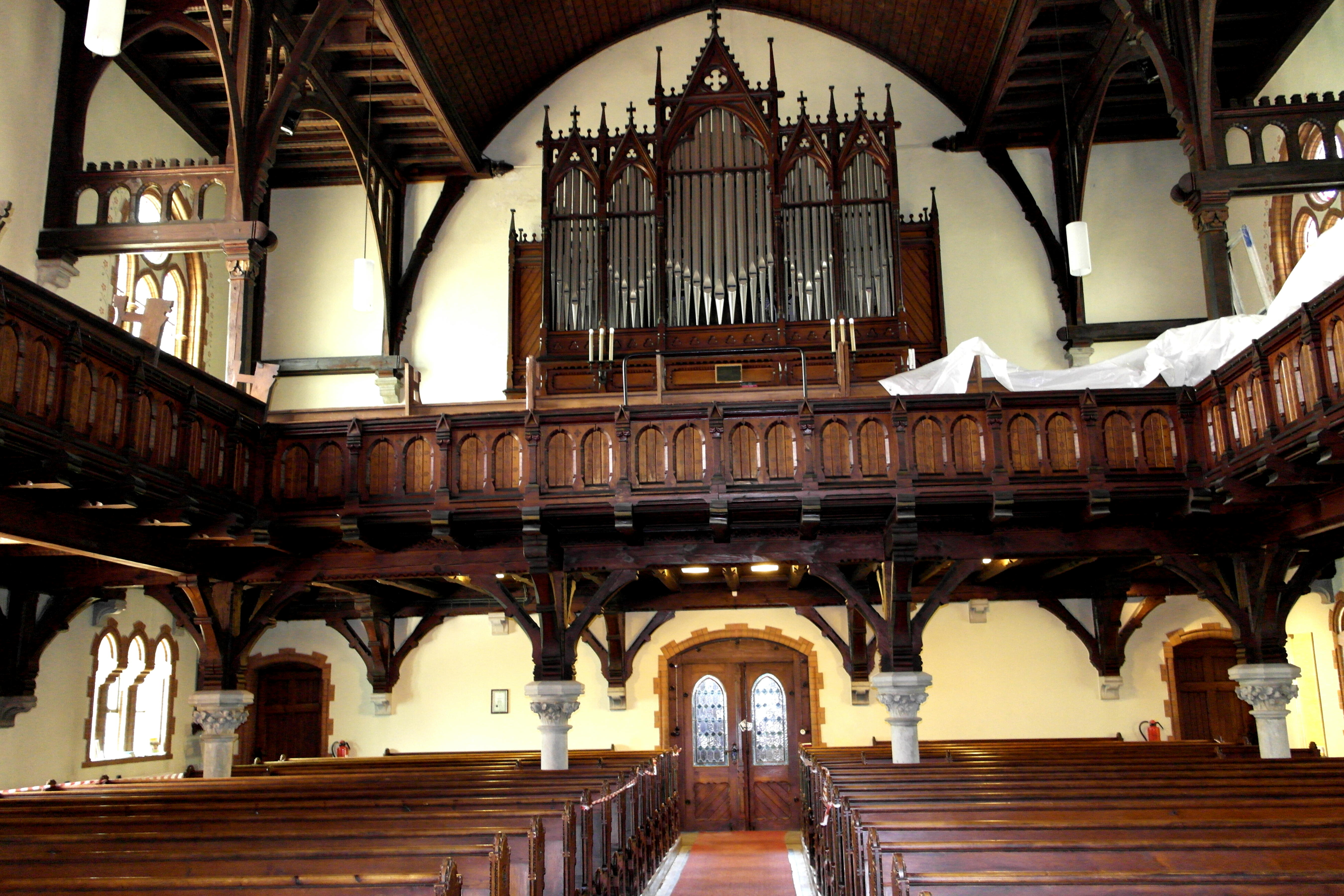 St.Trinitatiskirche in Bad Elster, Innenansicht